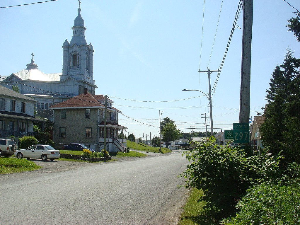 Photo de la route 297, à Saint-Moïse, Québec, Canada.